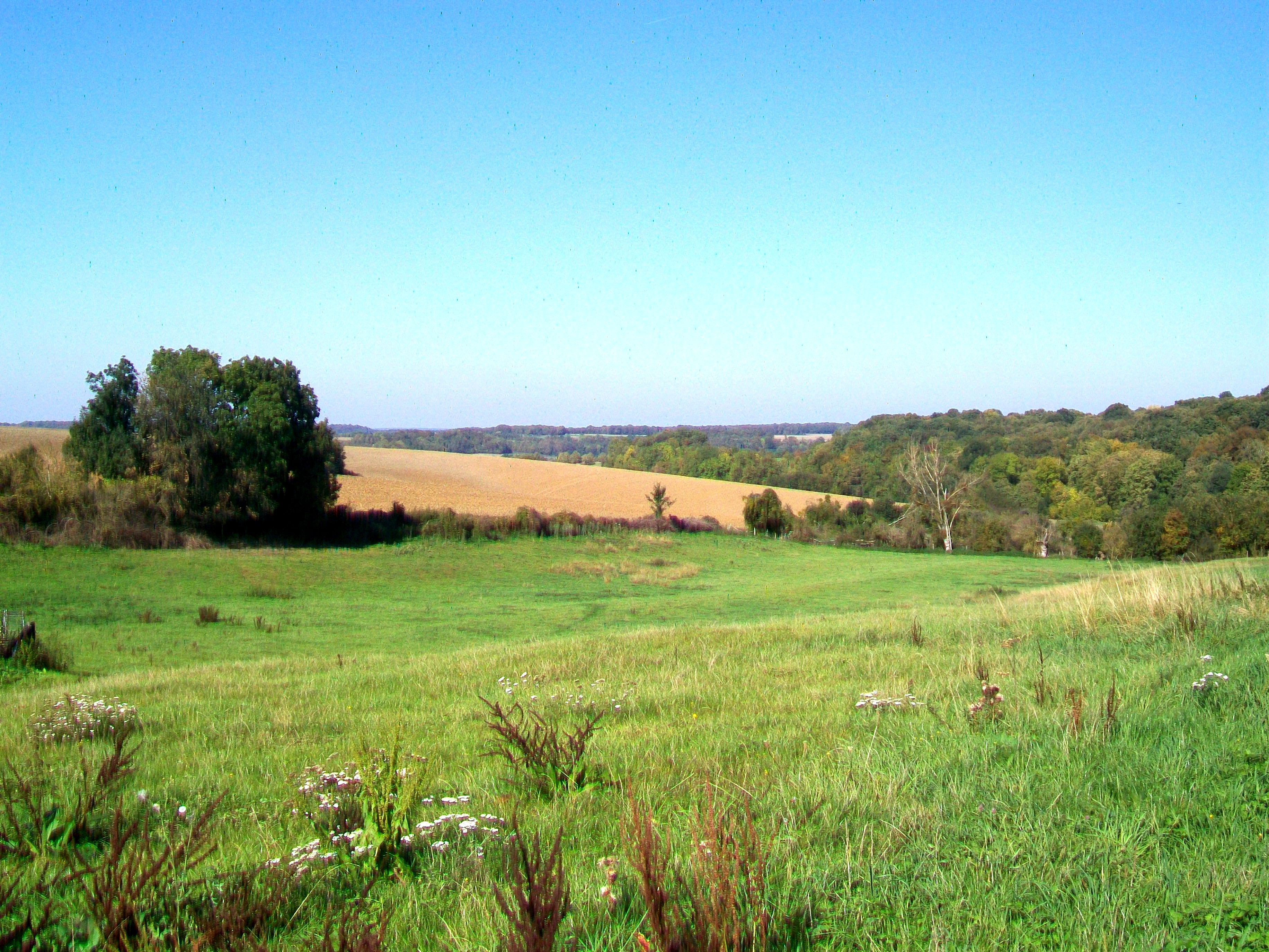 Vue sur la vallée de l'Ysieux depuis le sud.